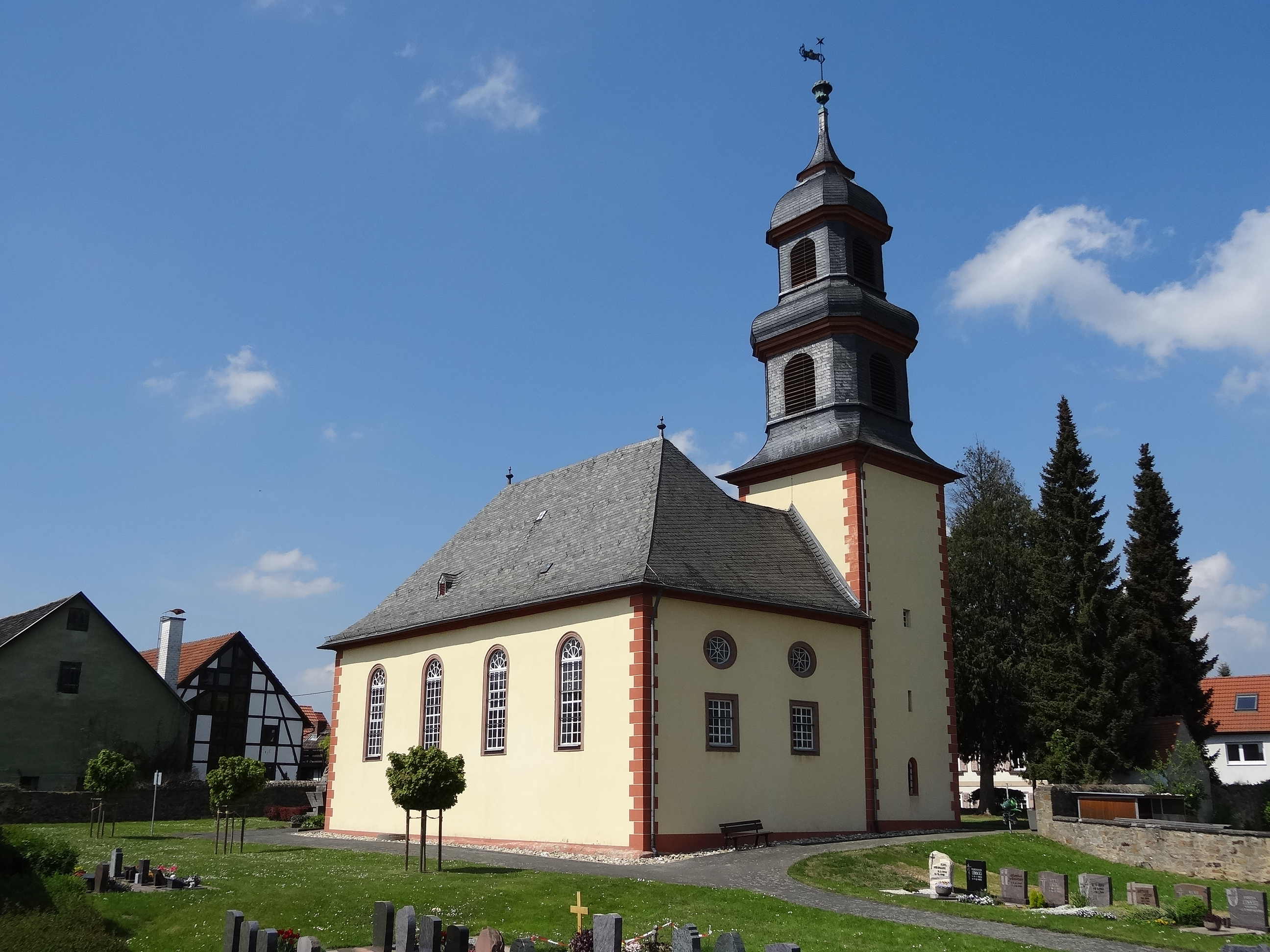 Evangelische Kirche Ober-Hörgern